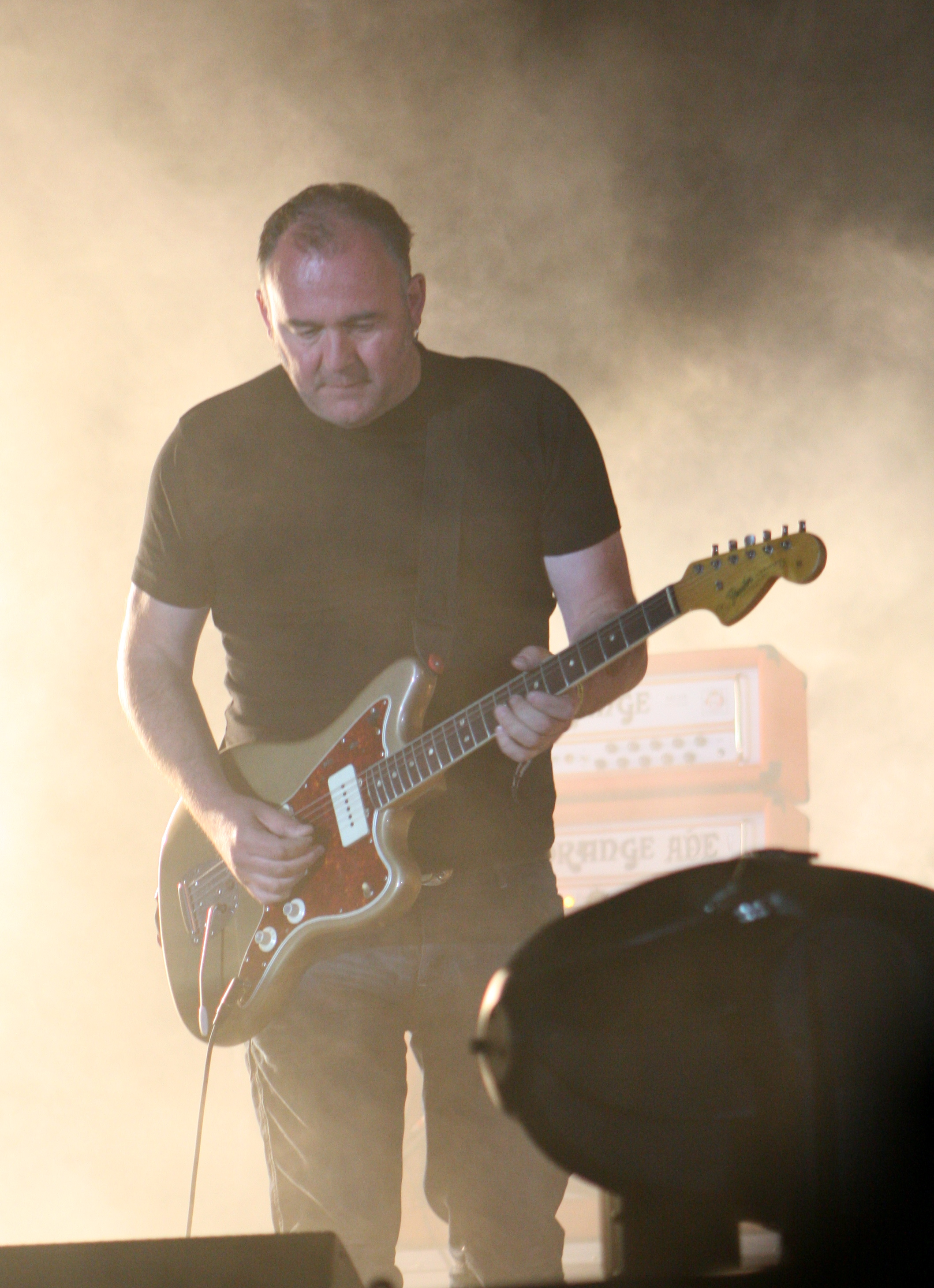 Adrian Utley ; concierto de Portishead en el Primavera Sound 2008 (escenario Rockdelux)